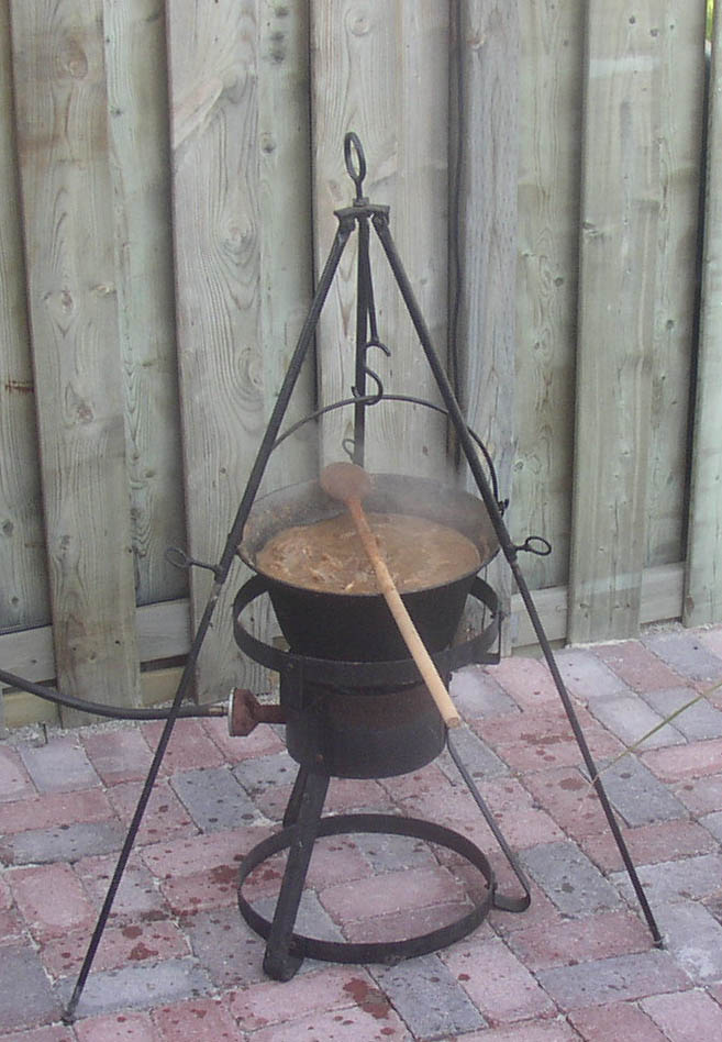 Laslo varga